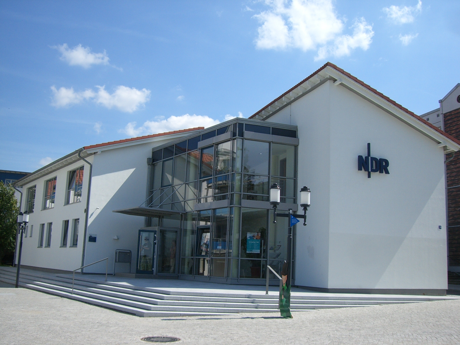 NDR-Regionalstudio für Vorpommern in Greifswald